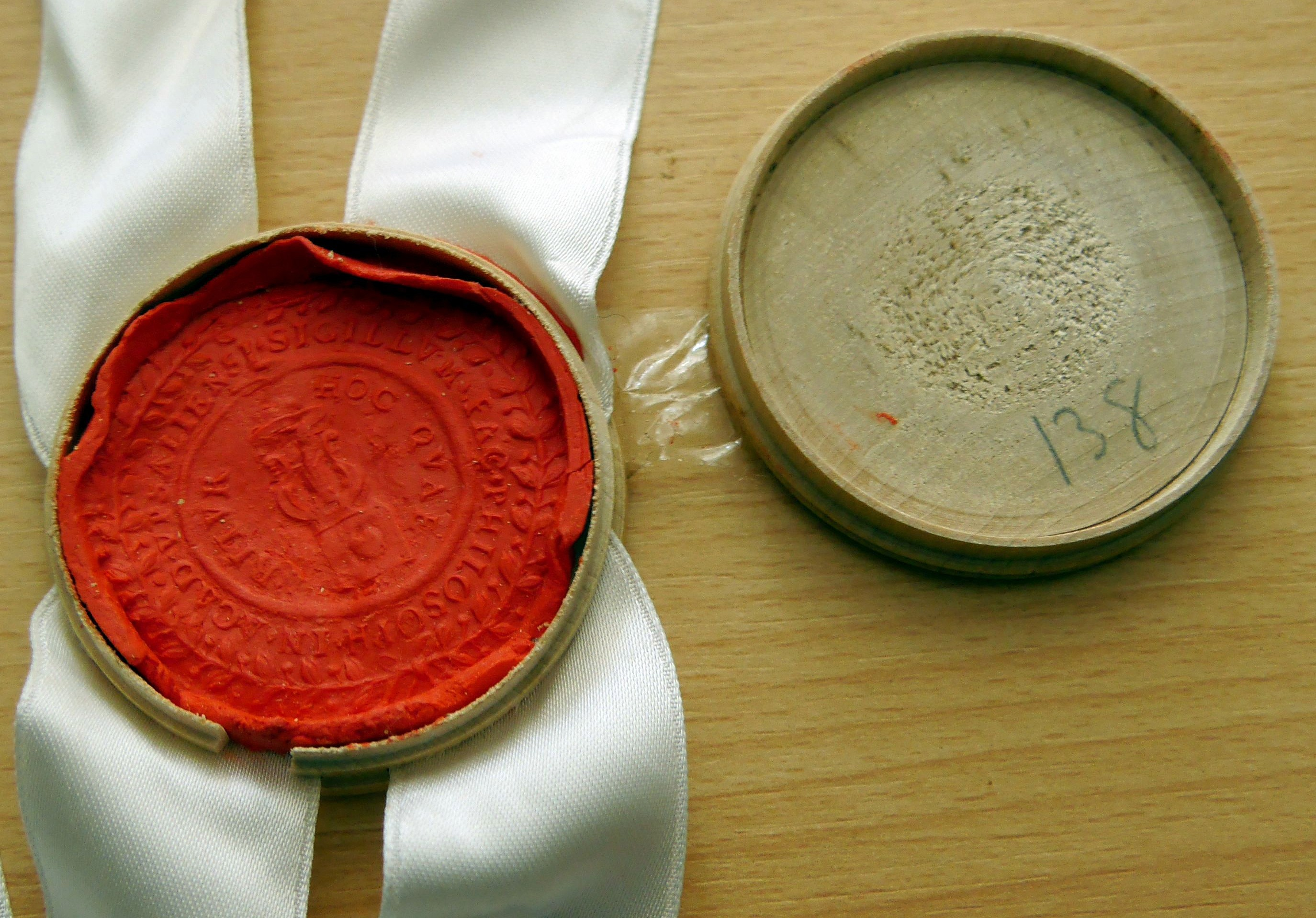 Siegel in runder Holzdose, Universität Uppsala (1973) Inschrift: SIGILLUM FAC PHILOSOPH IN ACAD UPSALIENSIS, Siegel der Universität Uppsala zur Urkunde Ehrendoktor für Friedrich Hund gehörig.